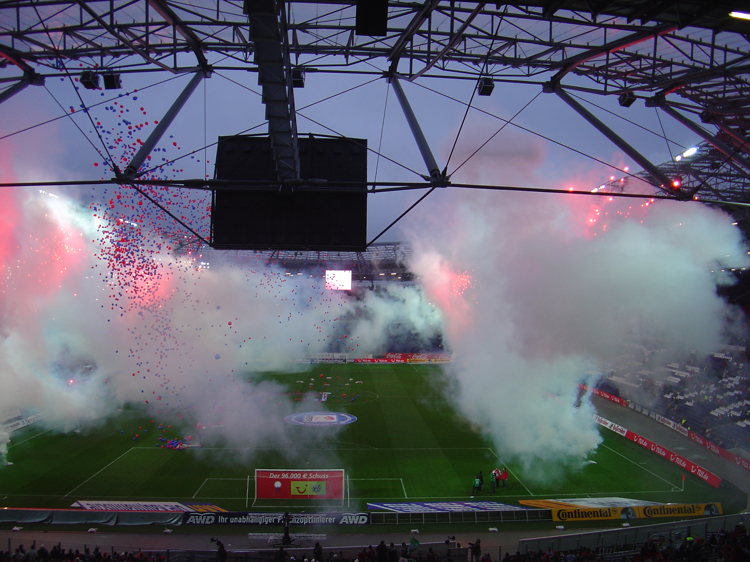 Feuerwerk zur feierlichen Einweihung der AWD-Arena am de:23. Januar de:2005 um genau 16 Uhr.